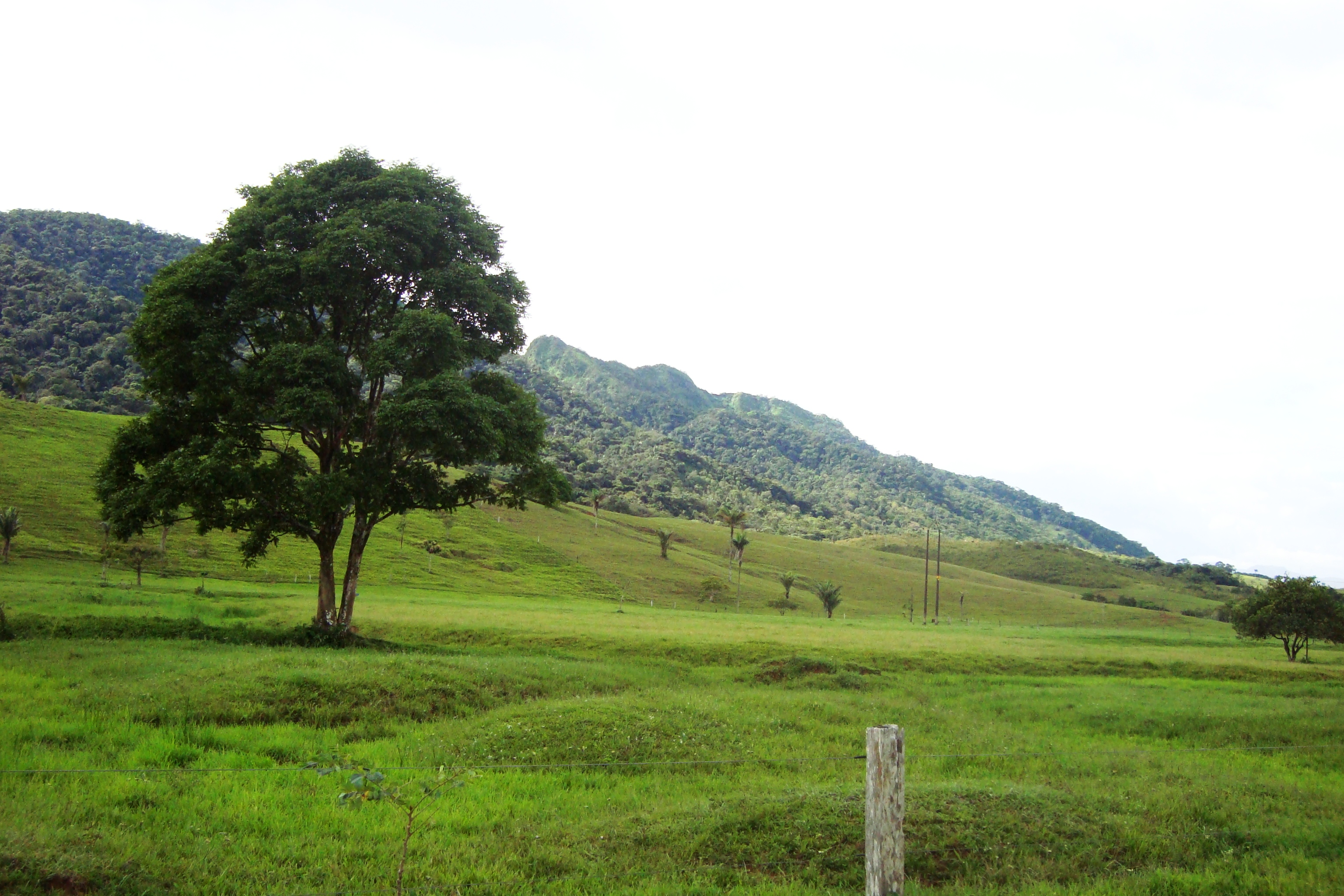 Piedemonte amazónico en zona rural de Florencia, Caquetá, Colombia